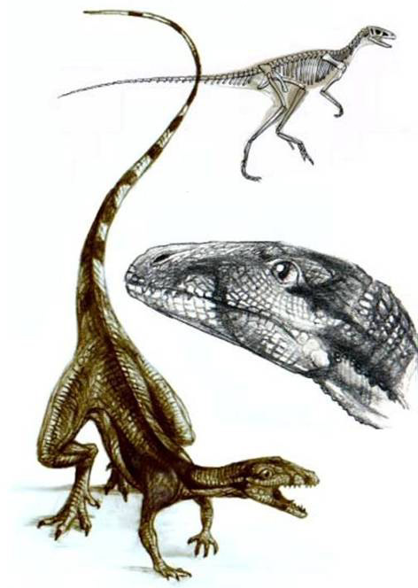 Lagosuchus.